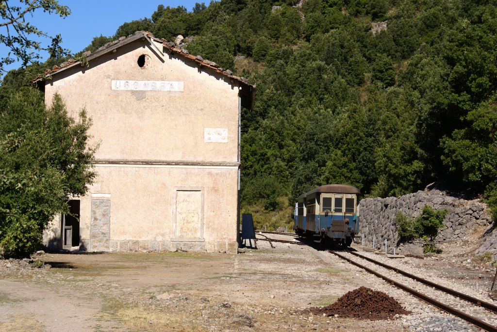 Stazione di Ussassai (luglio 2008)